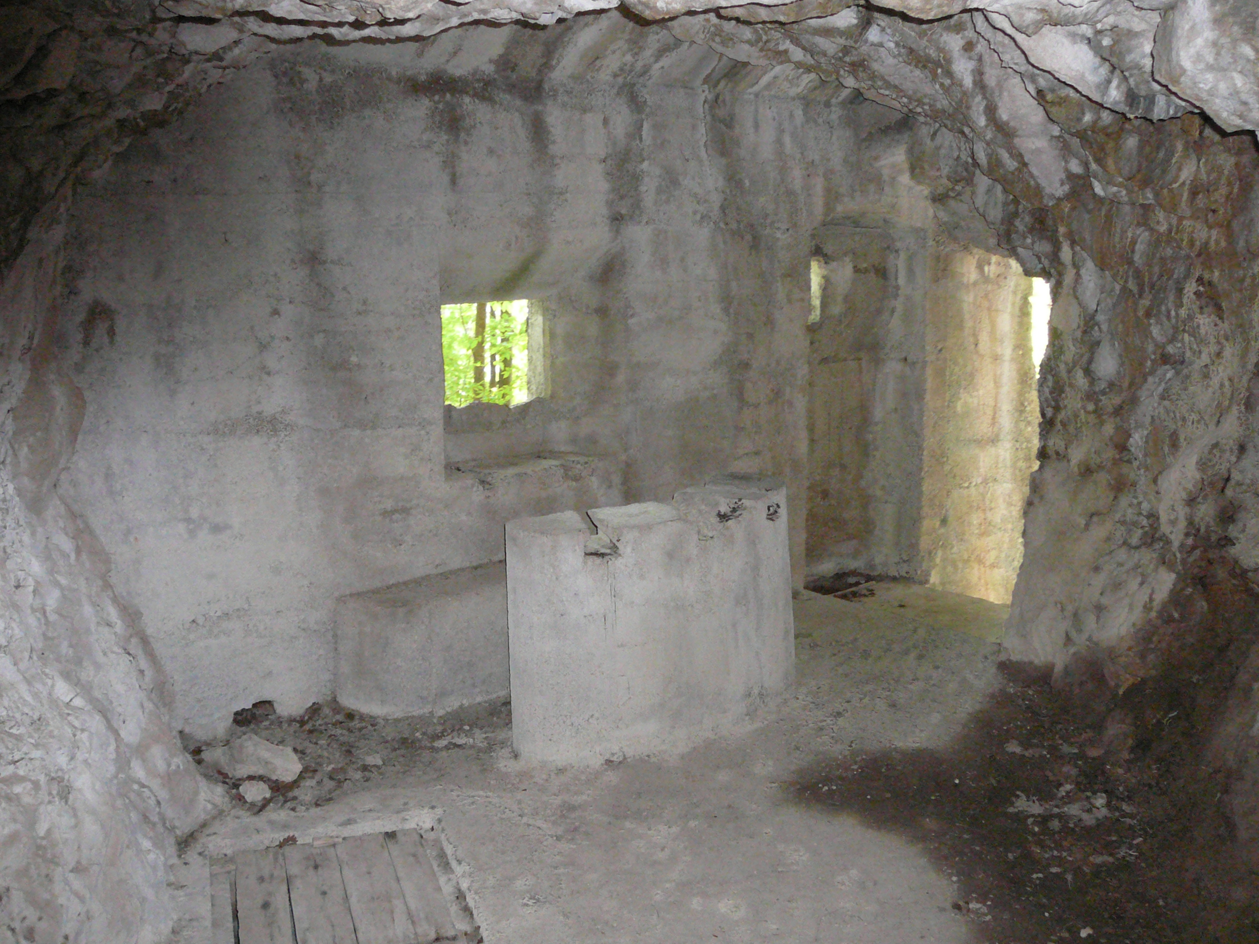 Cento Scalini presso Forte Roncogno